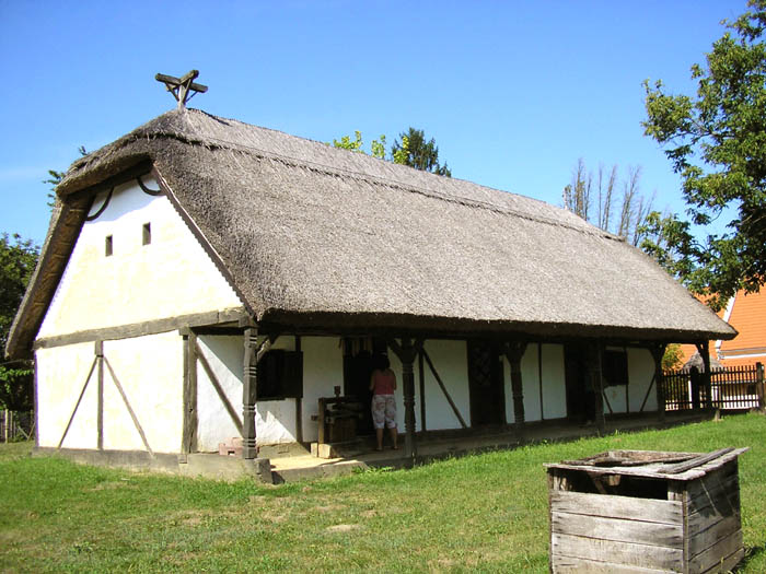 Talpasház, cím: Sellye, Köztársaság tér 6.; Az Ormánság egyetlen népi építészeti emléke a Sellyei Kiss Géza Ormánsági Múzeum udvarán található. A talpasházhoz tartozó épületek: kovácsmőhely, harangláb, gabonatároló, istálló, pajta, méhes.